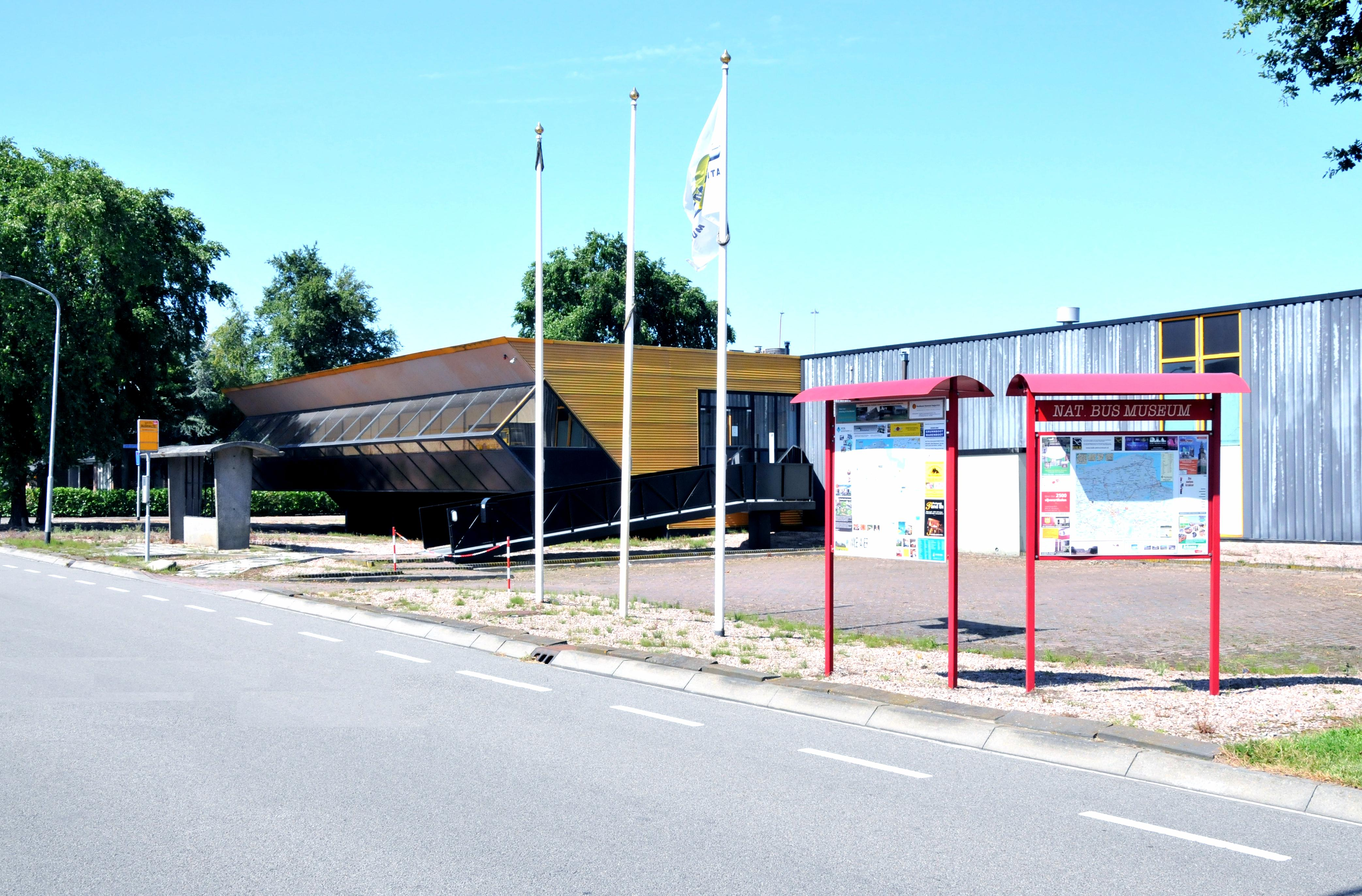 Nationaal Bus Museum (NBM) te Hoogezand, voorheen bekend als Noordelijk Bus Museum met als vestigingsplaats Winschoten. Het museum is sinds 13 april 2013 op woensdag en zaterdag voor publiek toegankelijk.